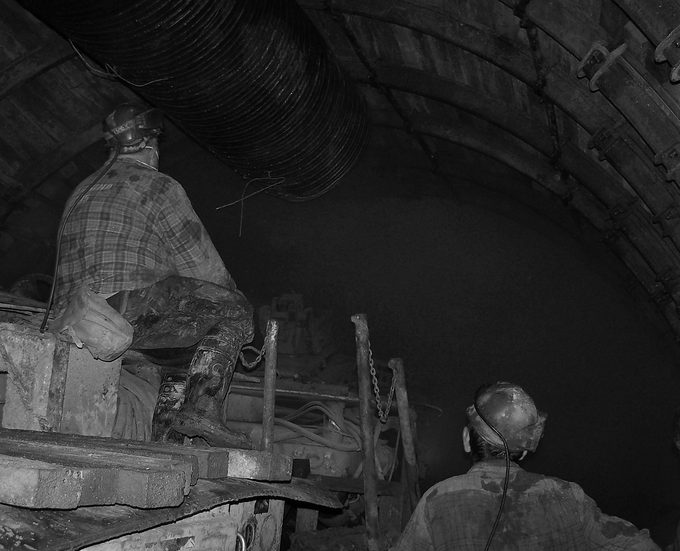 Lutniociąg przewietrzający przodek w kopalni węgla kamiennego. Przodek wyrobiska udostępniającego, przewietrzany za pomocą lutniociągu.